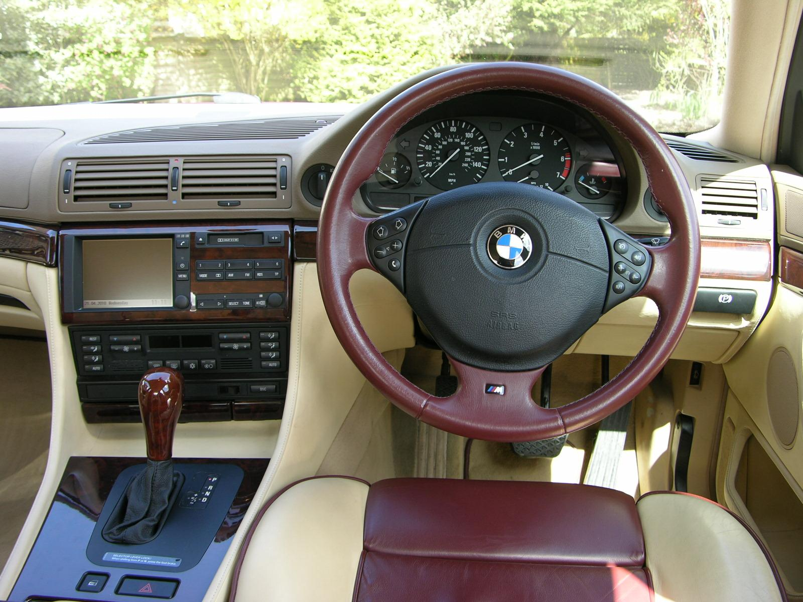 1998 BMW 740i Individual